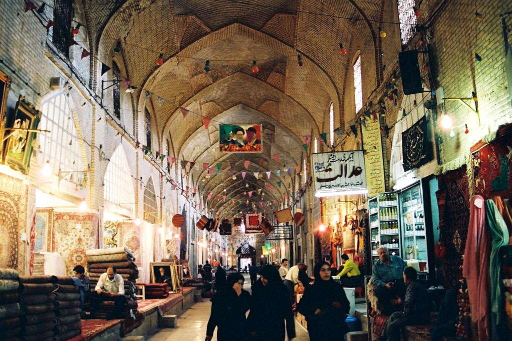 Bazaar-e Vakil, Shiraz, Iran.